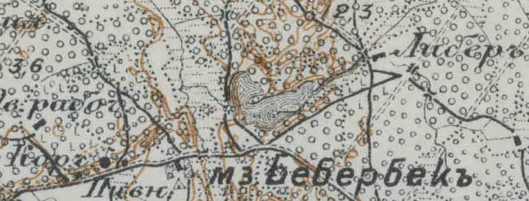 Бебербекское мельничное озеро на 2-х верстовой (1:84000) карте западного пограничного пространства